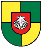 Wappen von Ahausen in der Gemeinde Bermatingen, Baden-Württemberg